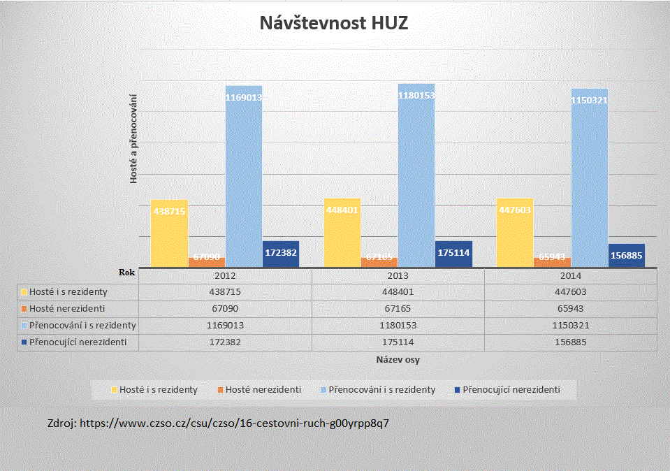 Návštevnost hromadných ubytovacích zařízení a přenocování v nich se započítám rezidentů i bez nich